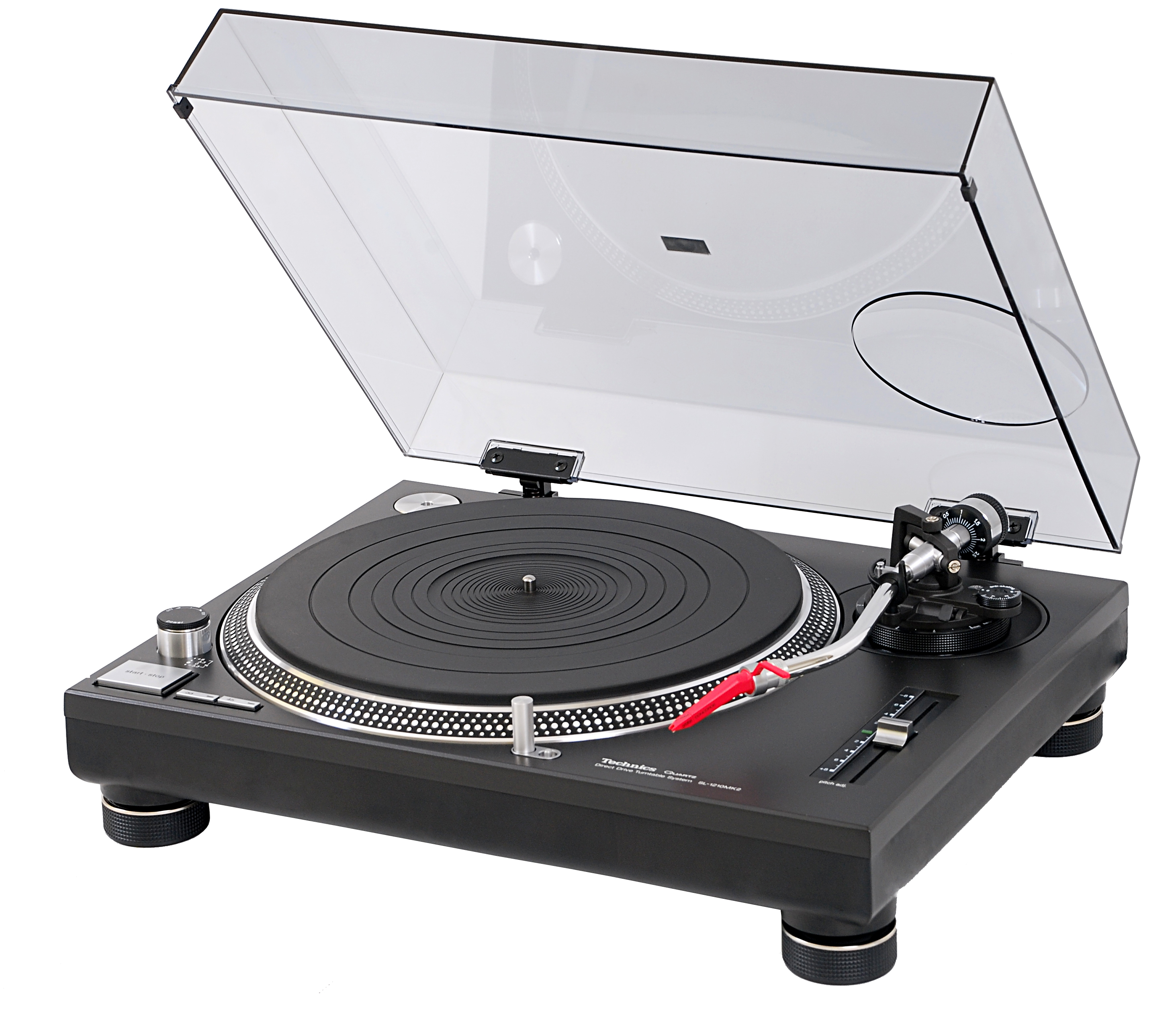 Gramofon SL-1210 MK2E firmy Technics